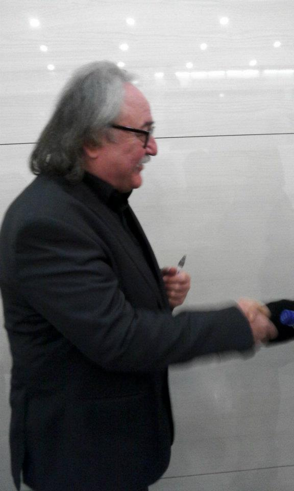 levay at 2012 Elisabeth Premiere